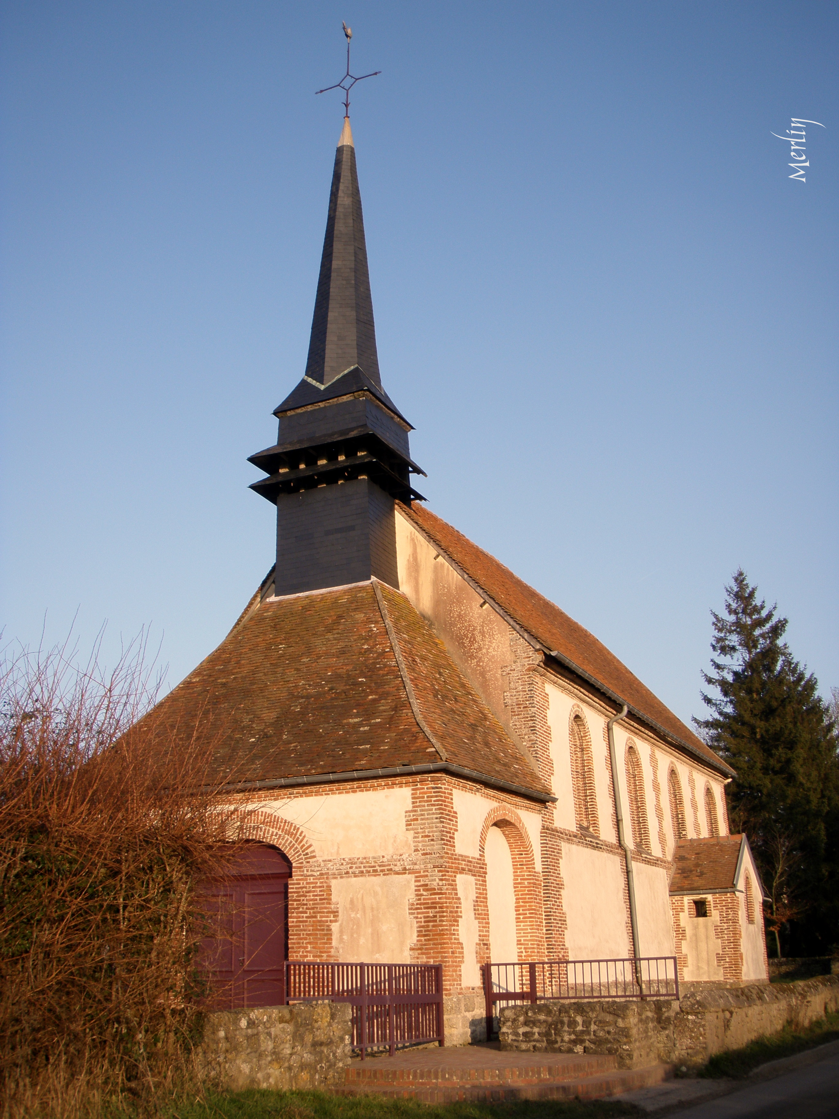 La chapelle de Bellozanne (Normandie)